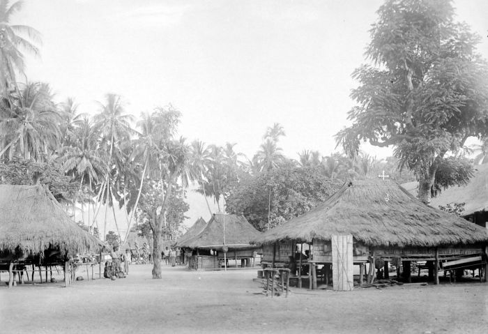 Negatief. Het dorp Konga